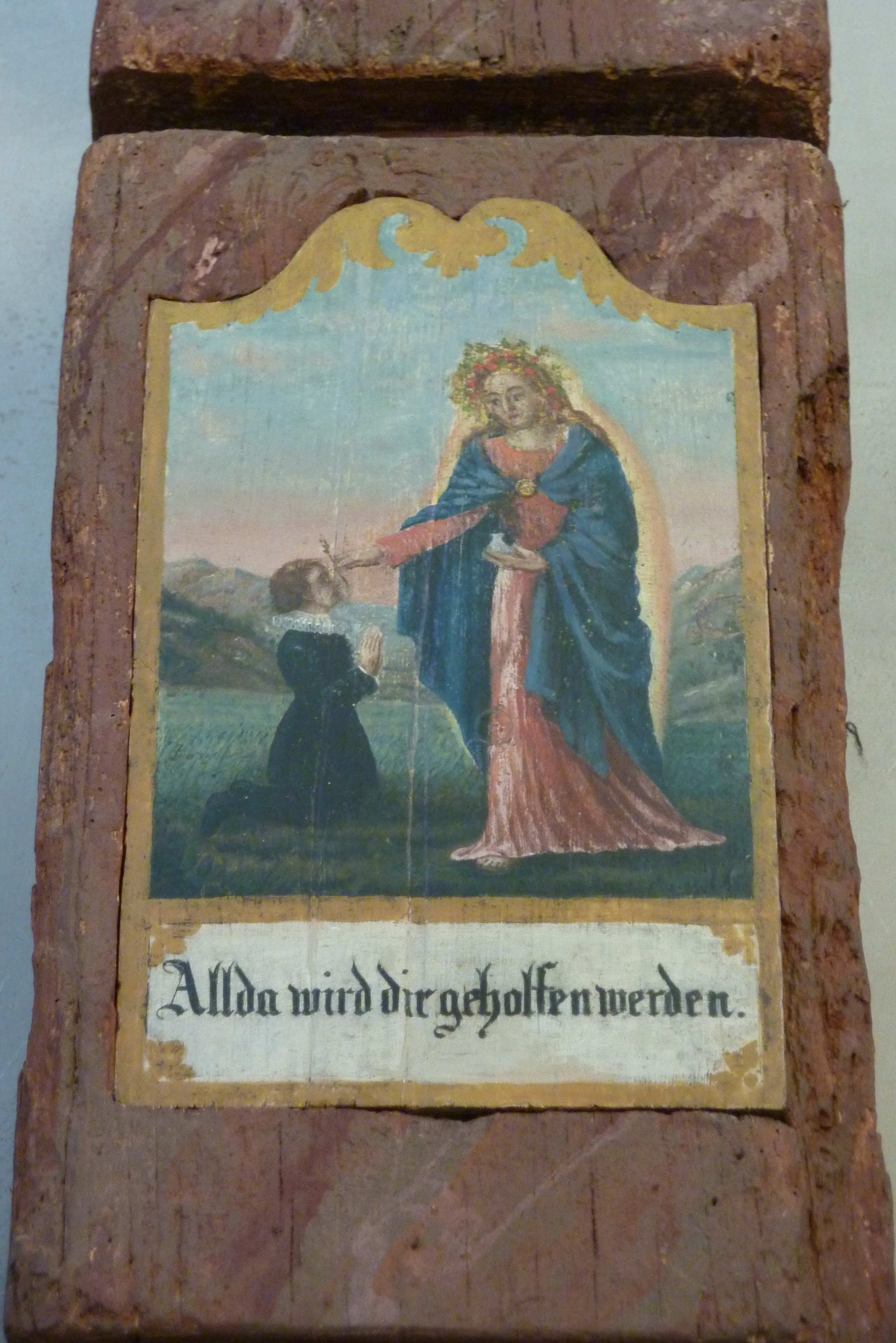 Wallfahrtskirche Mariä Heimsuchung (Zu Unserer lieben Frau vom Roggenacker) in Flochberg, einem Stadtteil von Bopfingen im Ostalbkreis (Baden-Württemberg), Gnadenbild (von 1582) an der Eichensäule